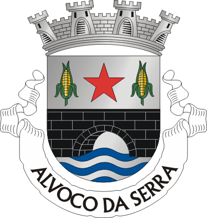 Brasão de Alvoco da Serra (concelho de Seia - Portugal)